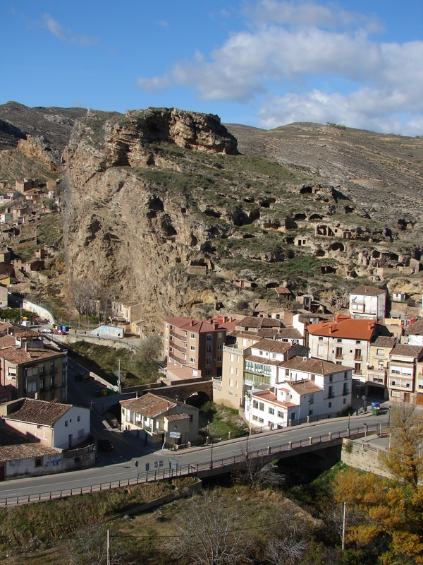 Peña del Castillo o de San Antonio en 2007